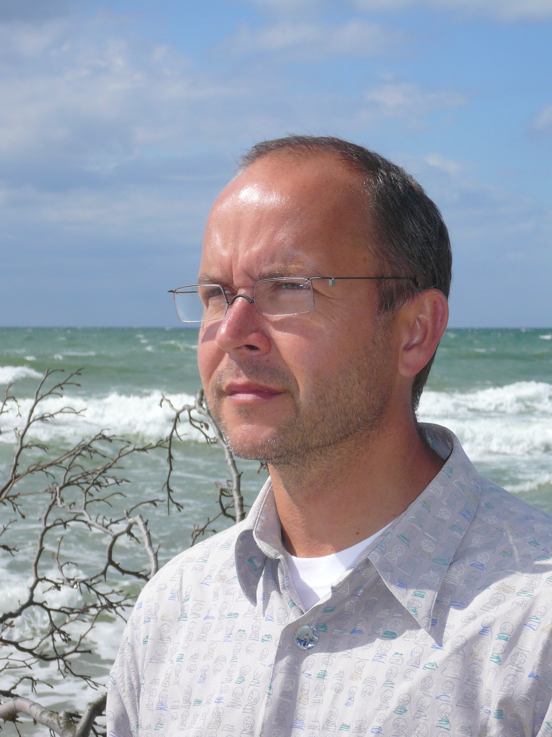 Porträt Albrecht Sack